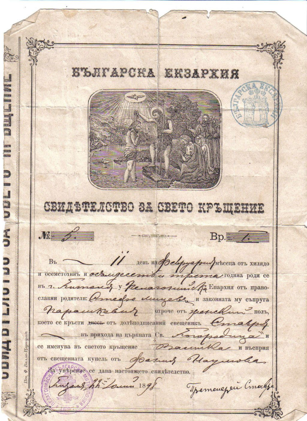 Кръщелно свидетелство от Битолската българска община с подписа на поп Ставре.